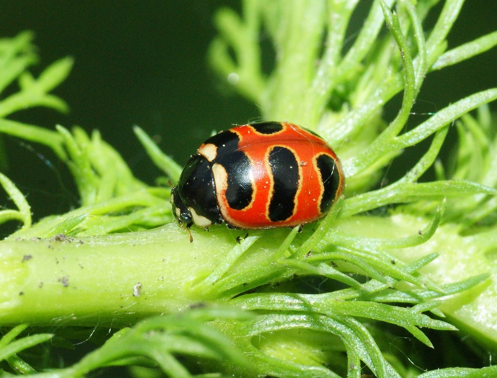 Трехполосая коровка. Coccinella trifasciata Linnaeus, 1758